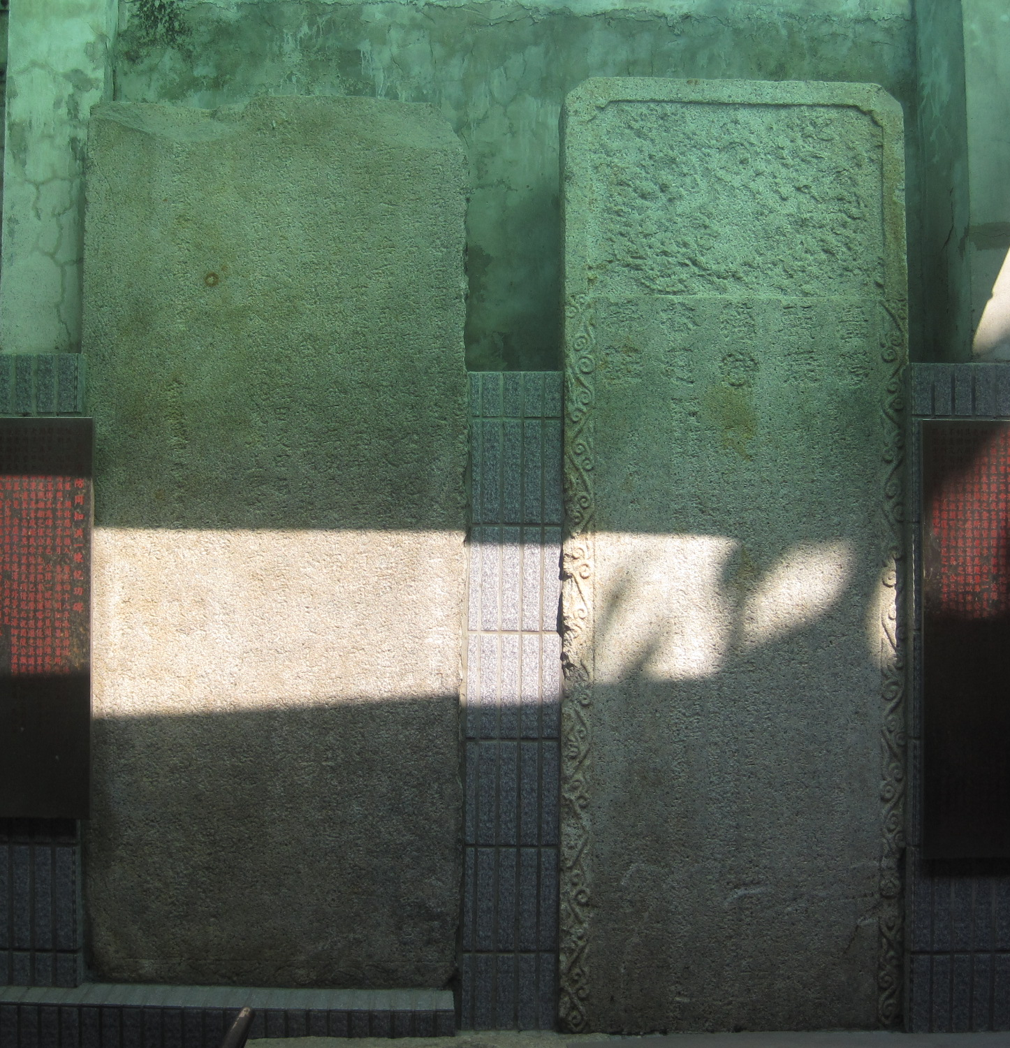 現存於臺南海安宮的「臺灣郡侯蔣公去思碑記」碑、「臺灣海防同知洪一棟紀功碑」